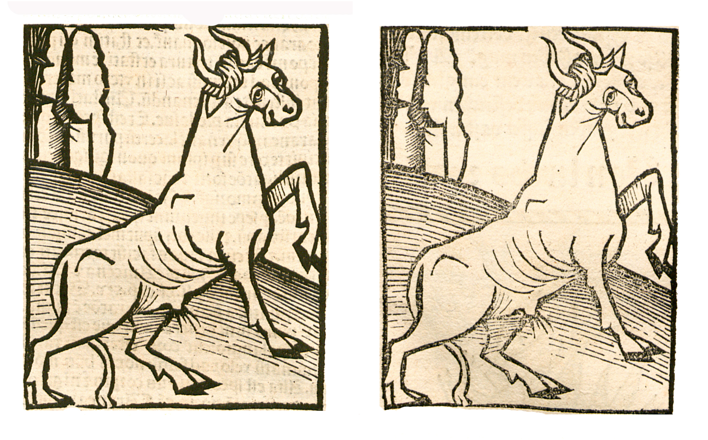 Abbildung von: Kuh Dreck